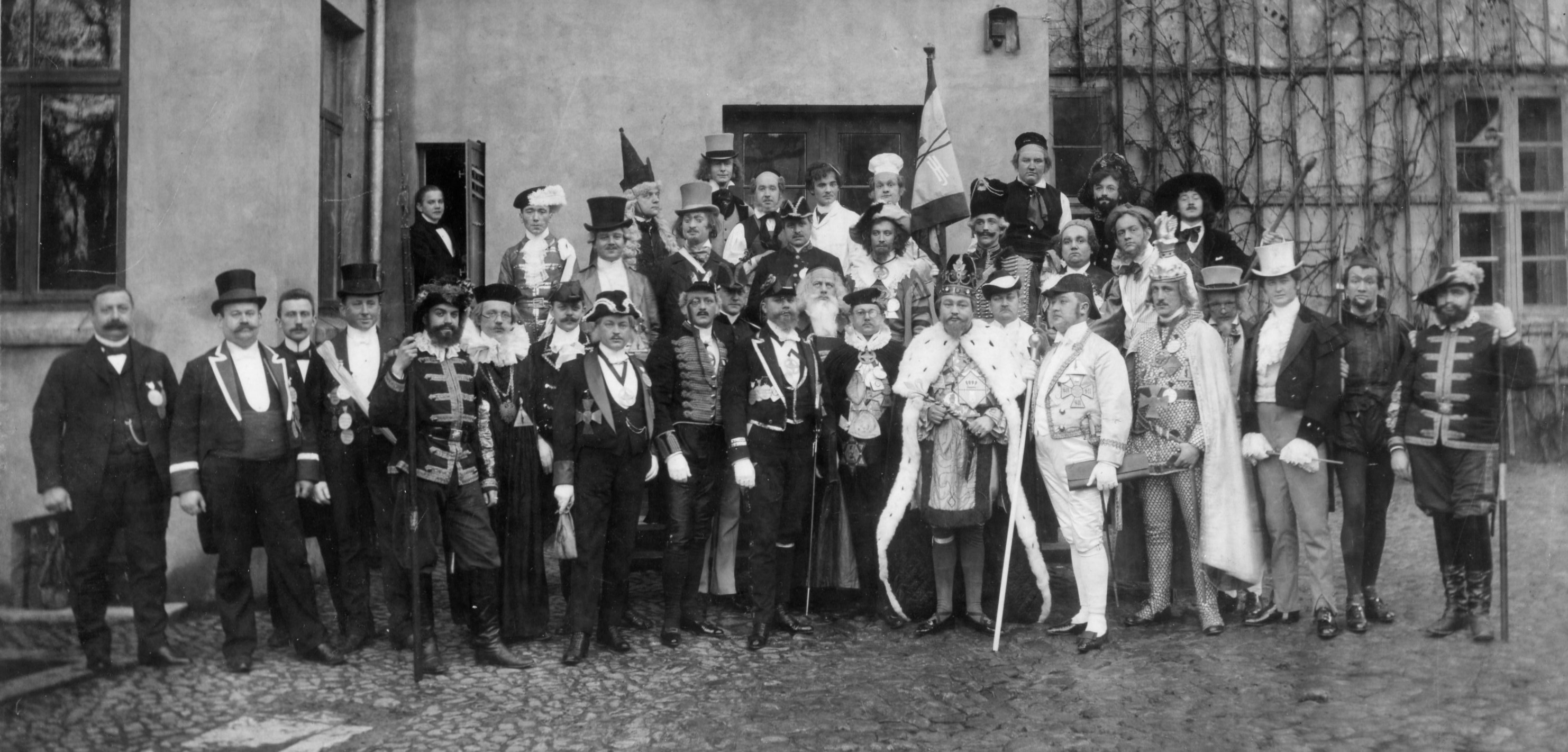 Fotografie der Teilnehmer am Großen Hoftag des Kaiserreiches Bützow [1]